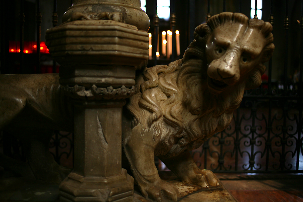 Uno dei due leoni posti a base del sarcofago di Stefano Visconti e Valentina Doria, in Sant'Eustorgio, Milano